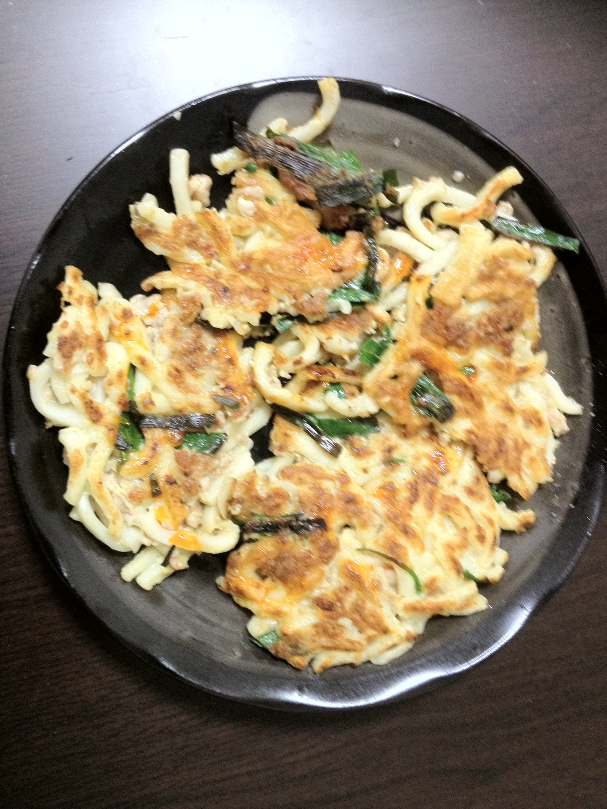 うどん餃子完成後